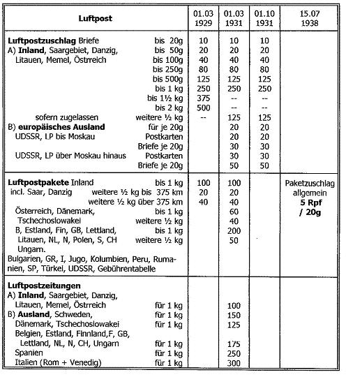 Reichspost, Luftpostgebühren